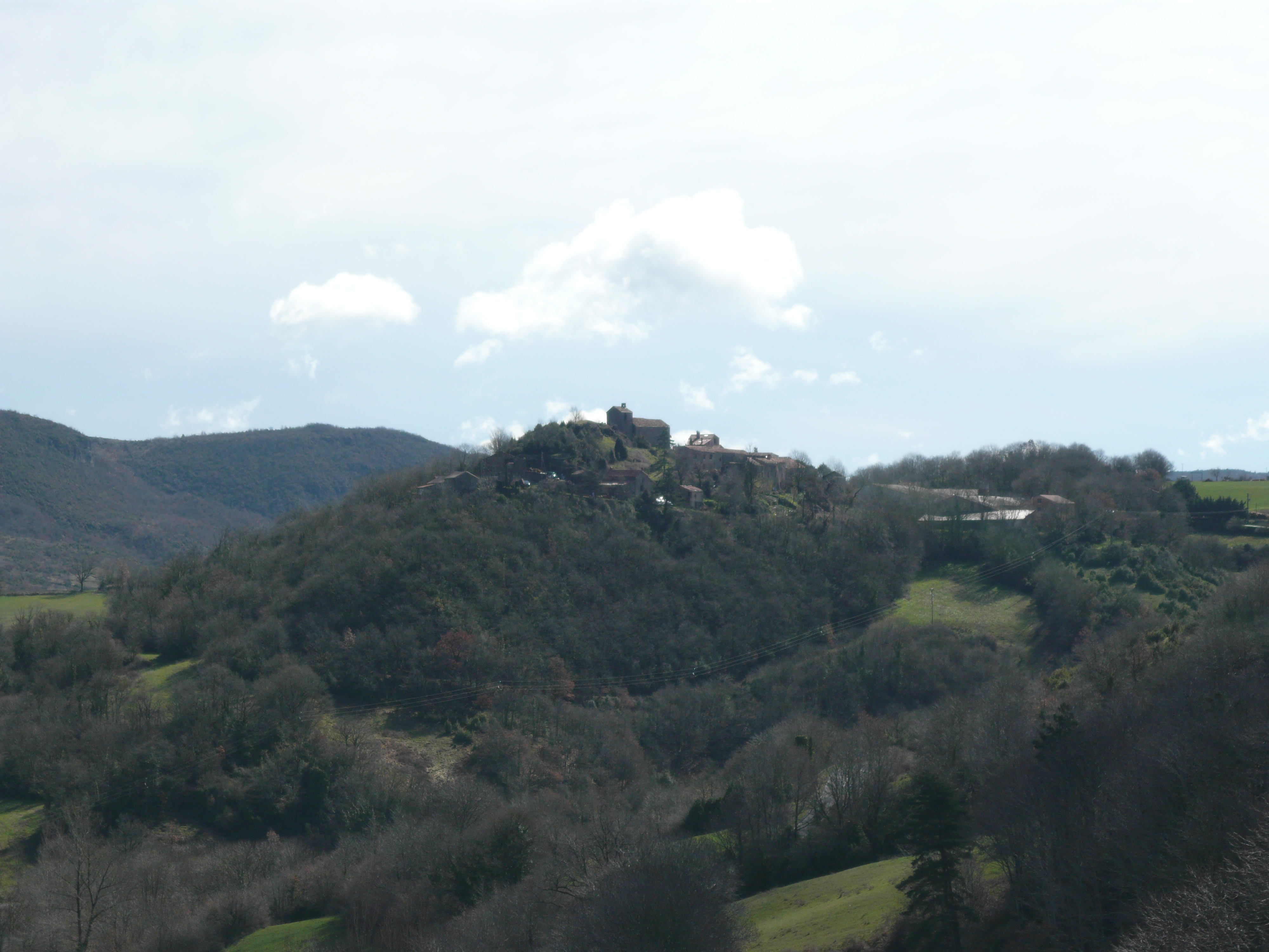 Village de Rocozels (Hérault en France)